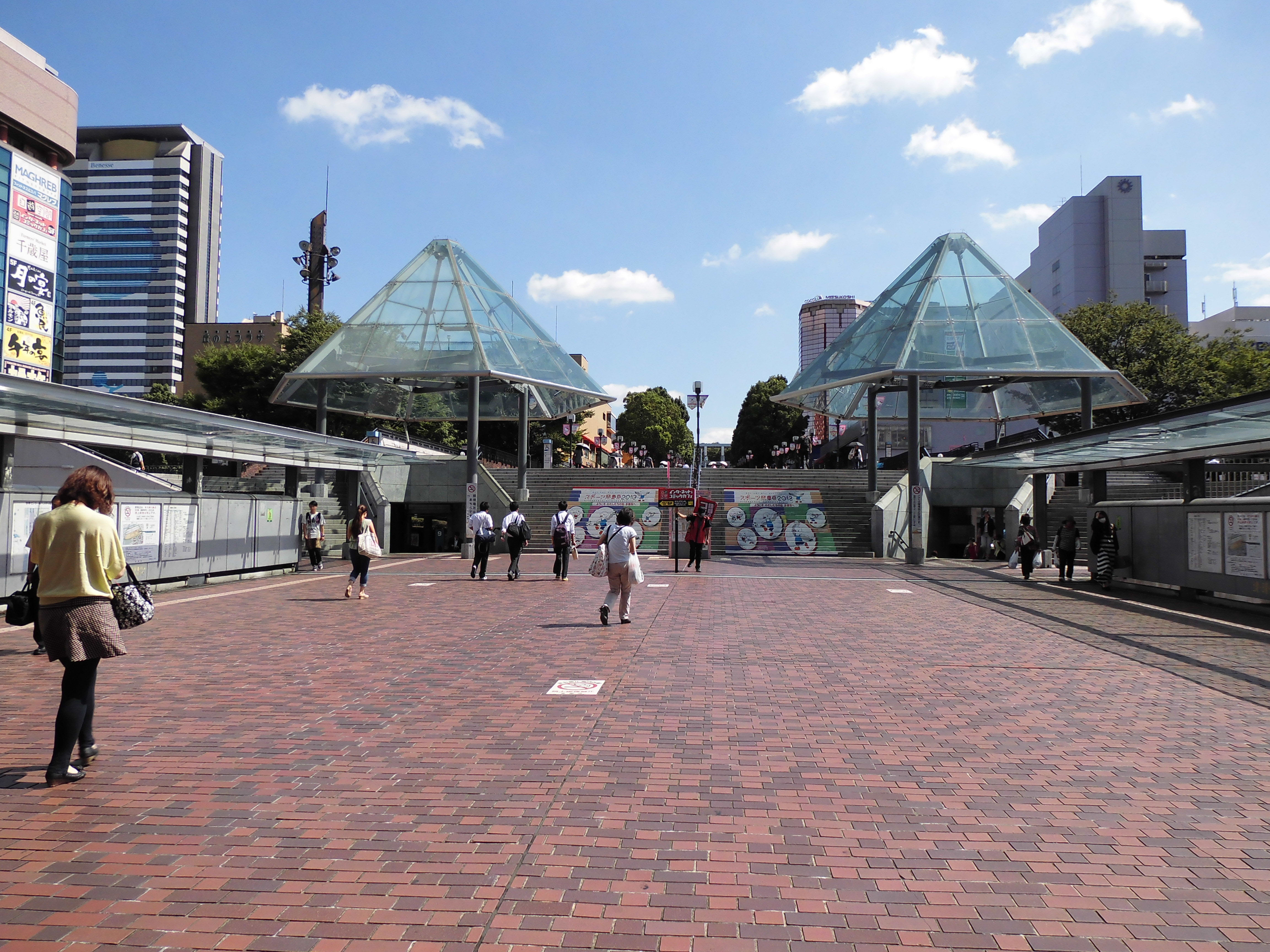 多摩センター駅前130827